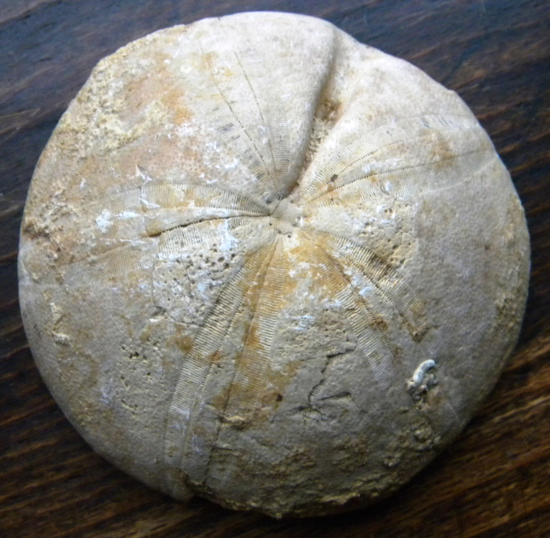 La ekino Clypeus plotii Fossilworks PaleoDB link: Clypeus Leske 1778 (extinct) World Register of Marine Species link: Clypeus Leske, 1778 (+ list genus + list species)